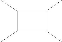 Placmat